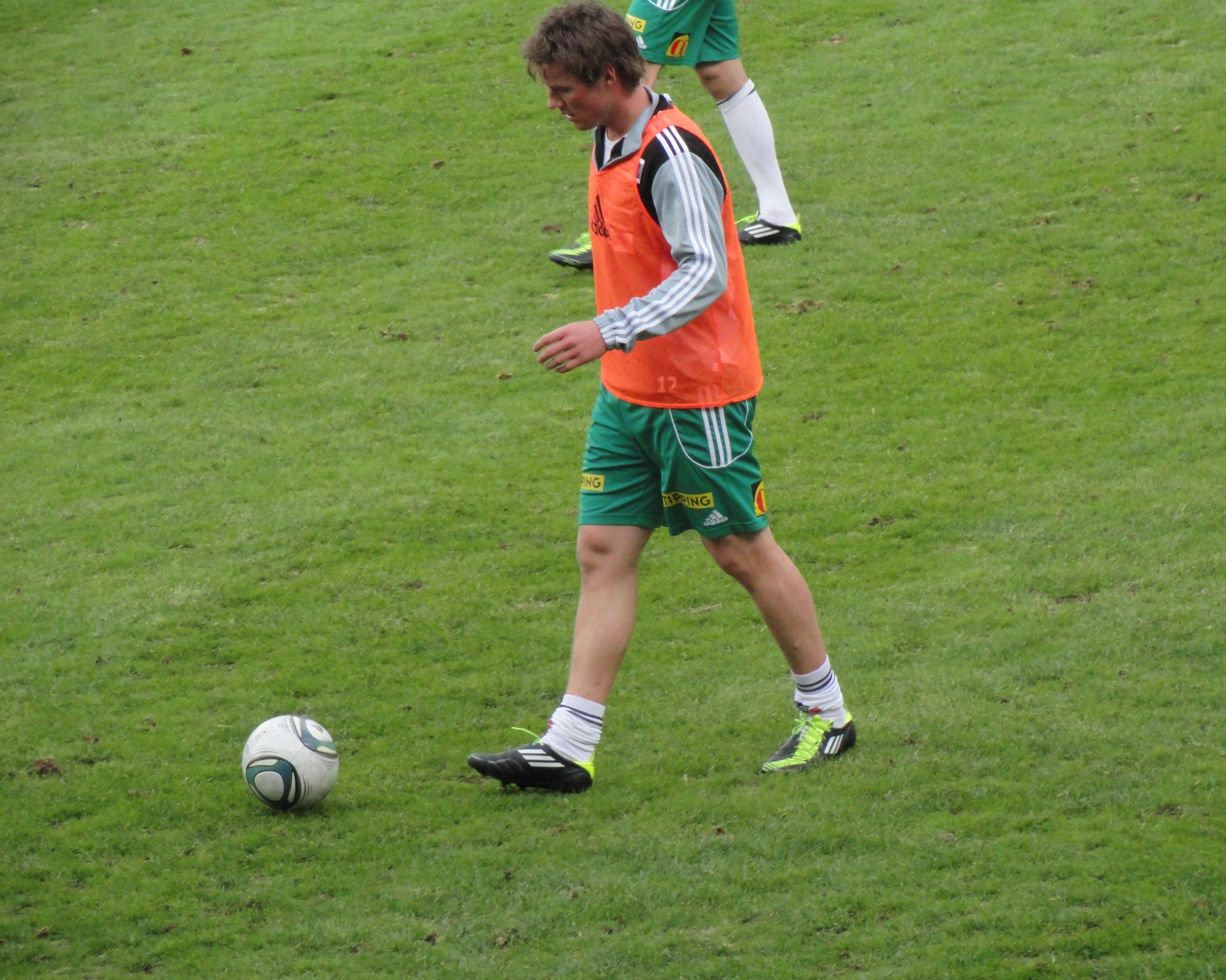 Bilde av Kirkevold